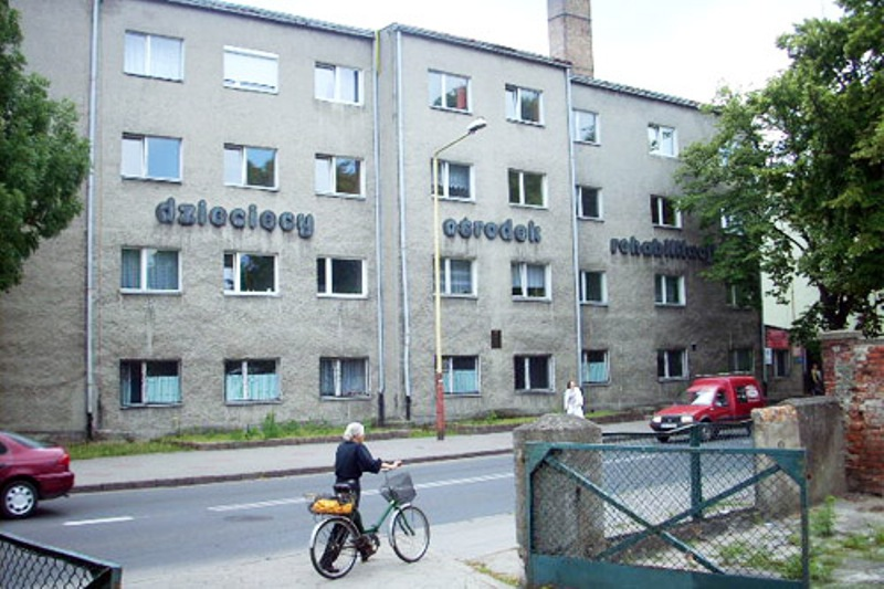 Ośrodek rehabilitacji SP ZOZ w Stargardzie Szczecińskim